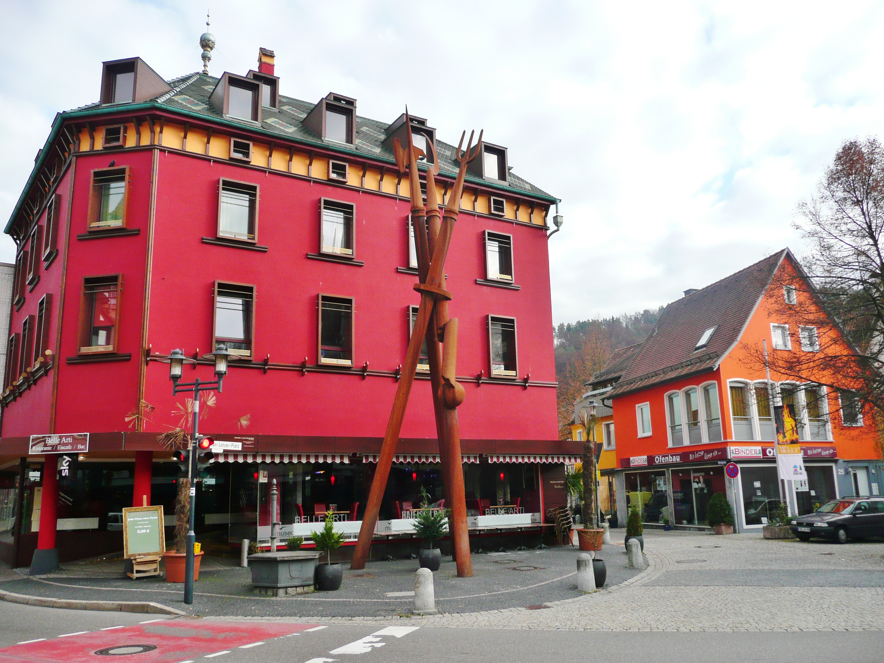 Beim 366 km langen Neckartalradweg: Belle Arti (Ristorante Eiscafe Bar), Horb am Neckar